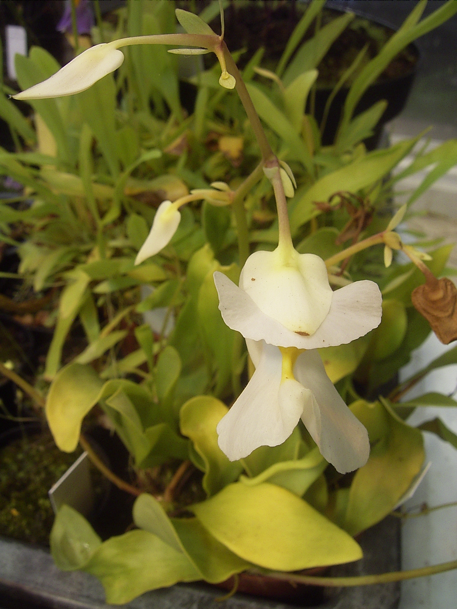 Utricularia alpina, July 2006.